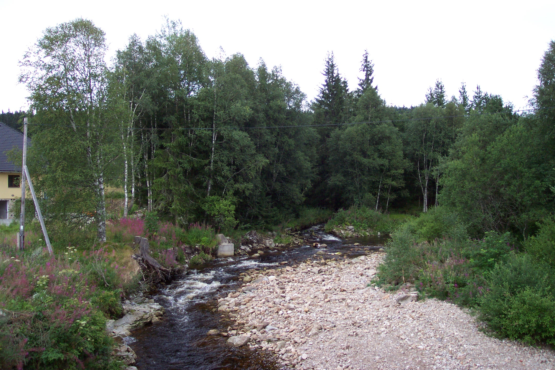 Šumava, Czech republic, River in Modrava village - Šumava, řeka na Modravě